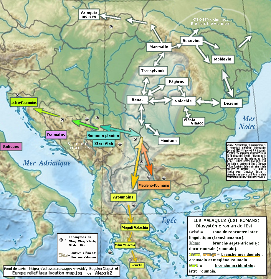 Carte des Valaques, flèches d'après Bogdan Giusca, fond de carte [1] par Alexrk2. Livres: voir la page de discussion pour les ouvrages historiques.